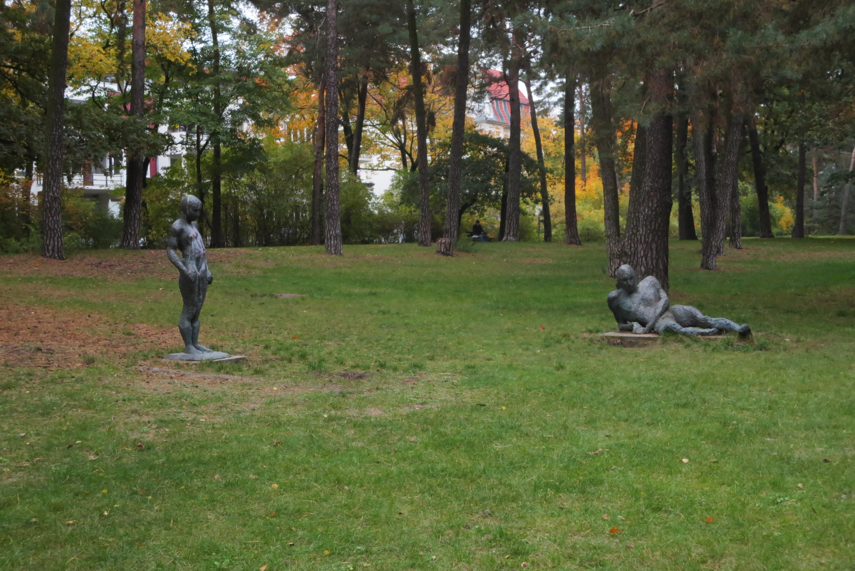 Bürgerpark Pankow, Statuen Ruhender Mann und Stehendes Mädchen von Sabine Teubner-Mbaye